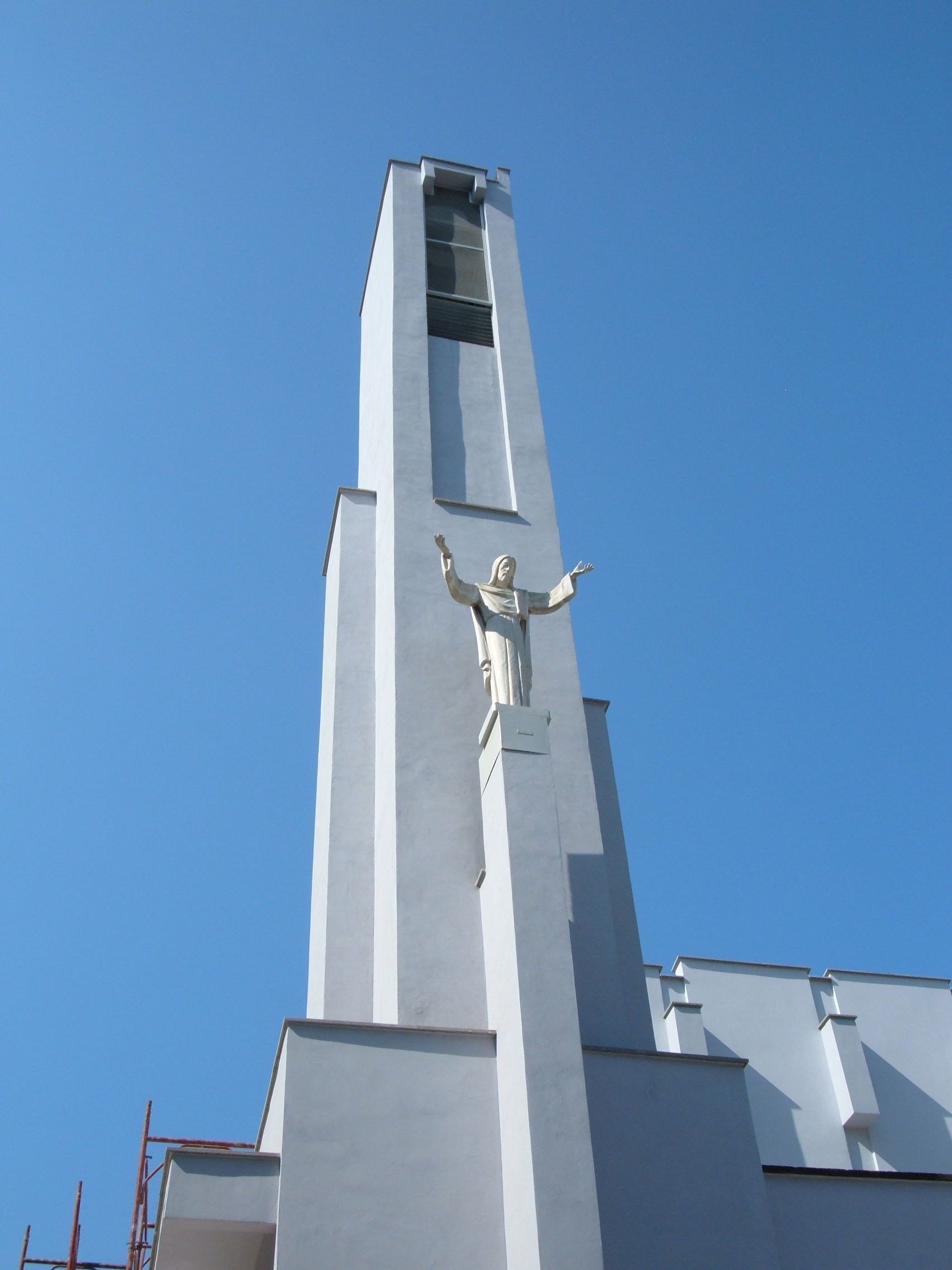 Chiesa di San Gregorio Magno, a Roma, nel quartiere Portuense.